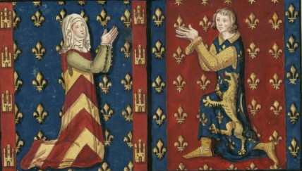 Louis de Brienne et Agnès de Beaumont in Abbaye Notre-Dame d'Etival-en-Charnie (Chemiré-en-Charnie, Sarthe)